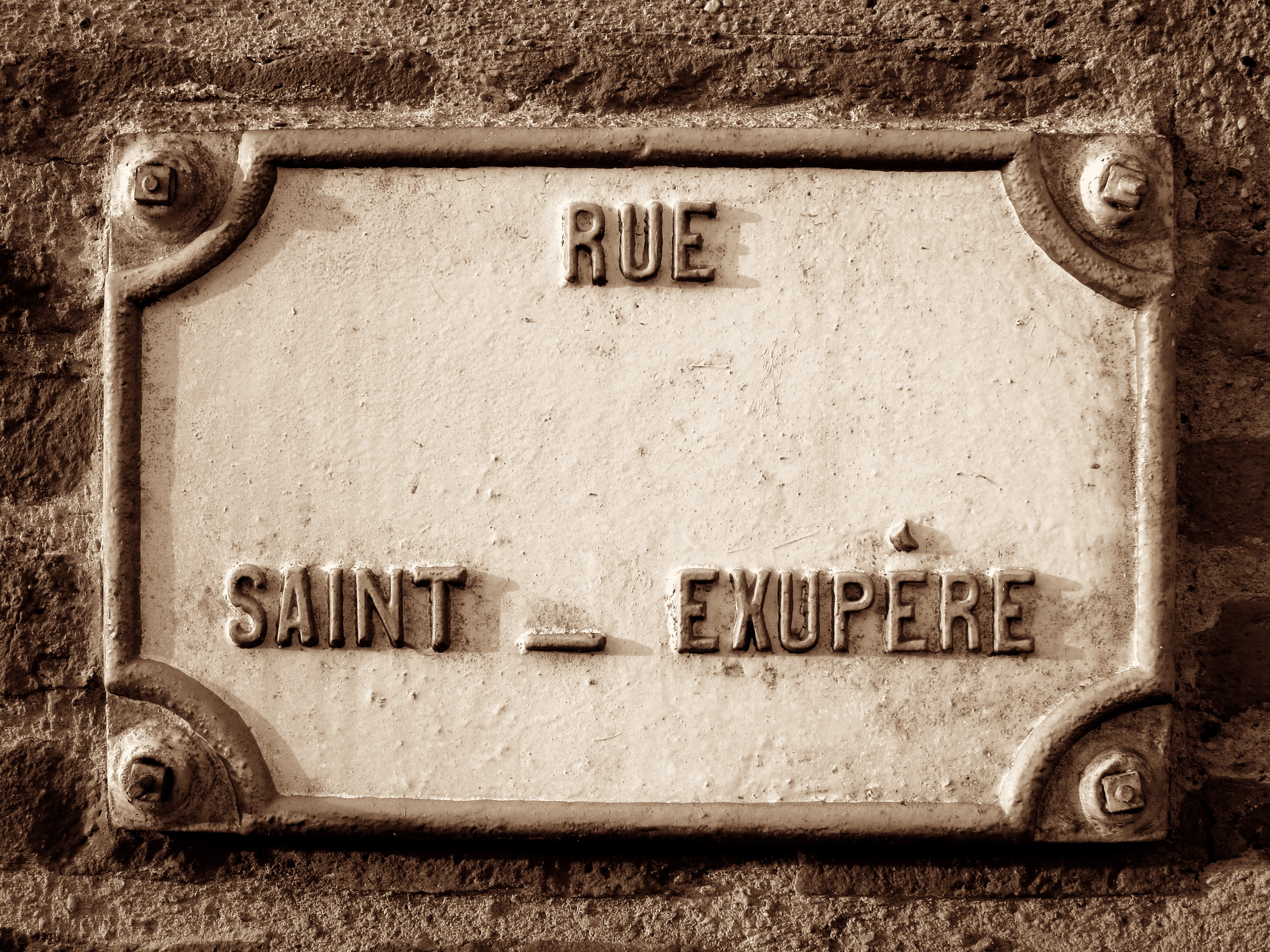 Blagnac (Haute-Garonne, Midi-Pyrénées, France) : Plaque de la Rue Saint-Exupère.